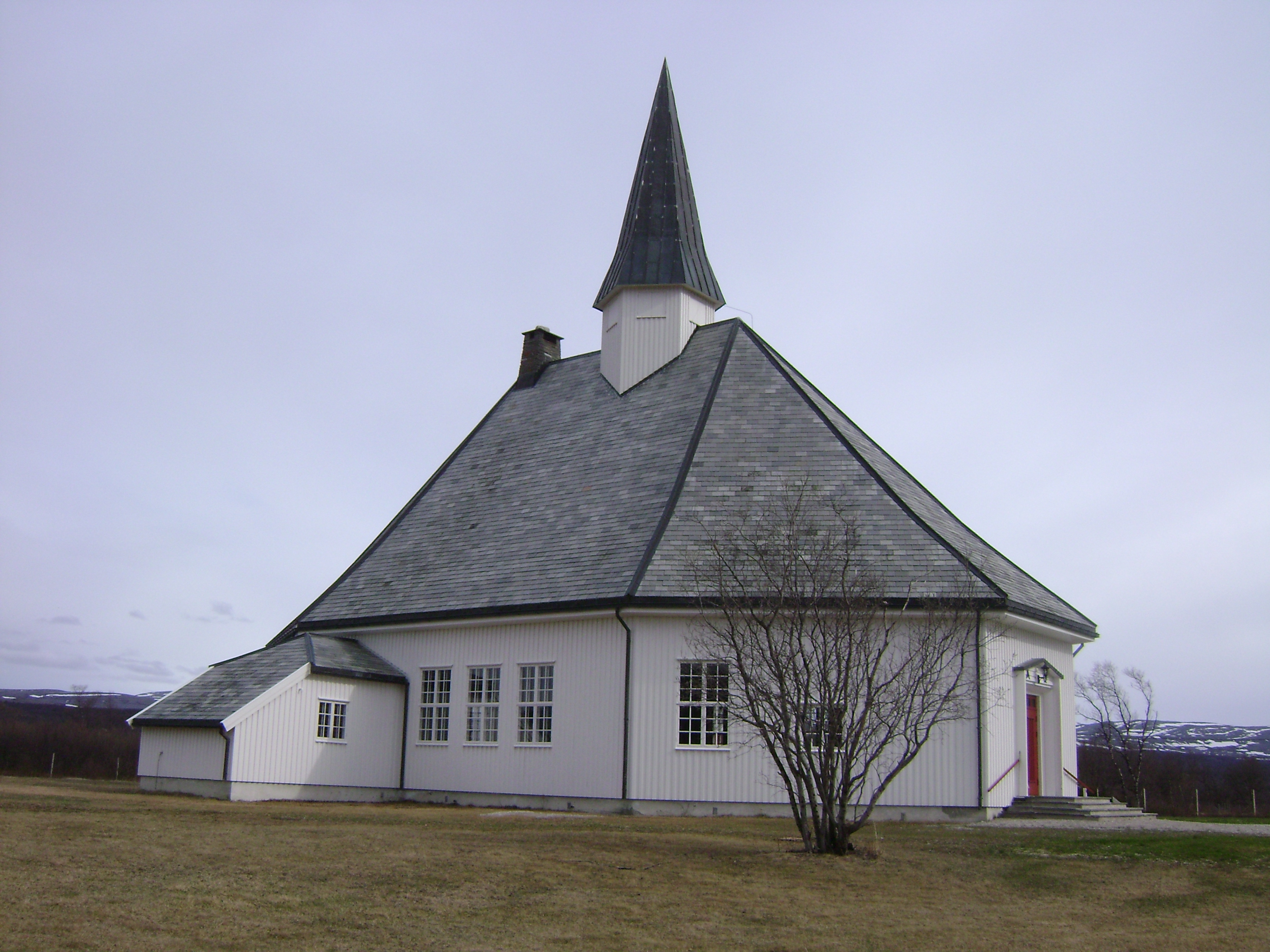 Børselv kirke i Porsanger kommune, Finnmark. Reist 1958. Arkitekt Valdemar Scheel Hansteen (1897–1980).